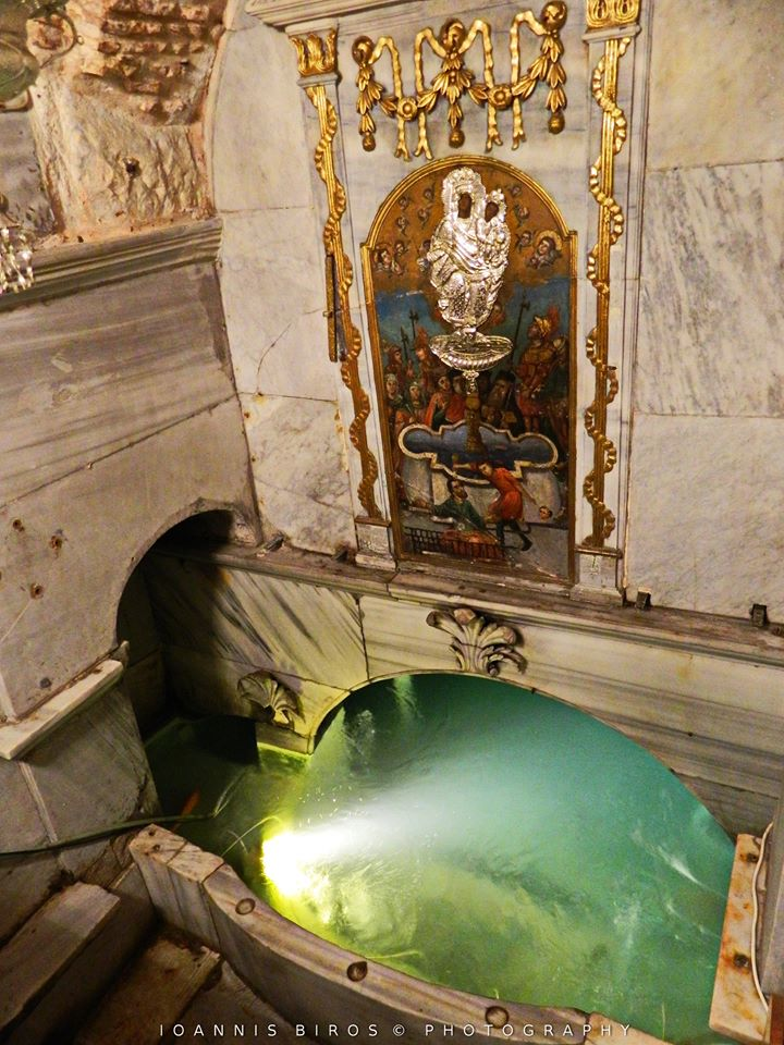 Ζωοδόχος Πηγή του Μπαλουκλή Αγιασμα Εικονα